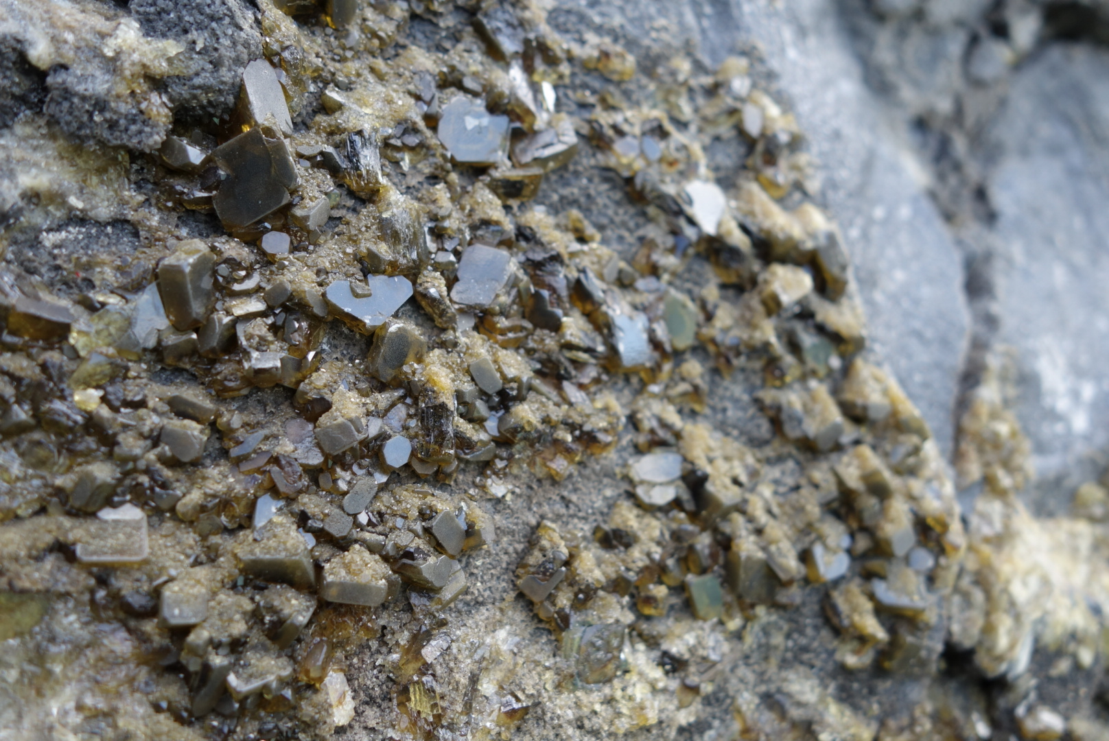 Radiobaryt am Steinbruch von Jenikov-Lahost, Usti Region, Tschechische Republik